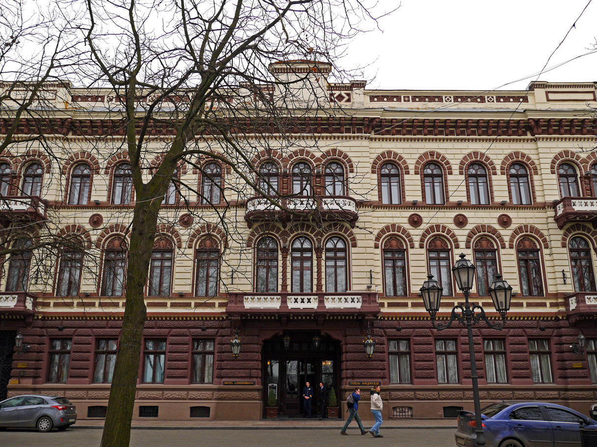 Палац Лопухіна, Раллі, готель «Лондонський», у якому жили у 1902 році Ф.І.Шаляпін — російський оперний співак; у 1882, 1891, 1893 роках А. Рубінштейн — композитор і піаніст; у 1920 і 1925 роках А.Луначарський — перший нарком просвіти РРФСР; у 1951 році А.Хачатурян — композитор, академік, народний артист СРСР та інші, Одеса, Приморський бул., 11